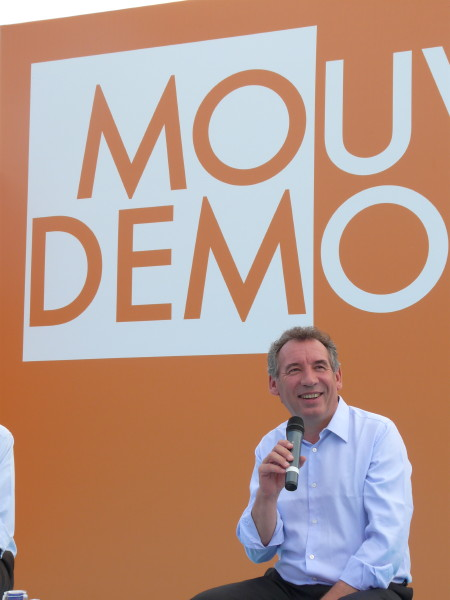 Photographie prise lors du forum « Europe et International » à Cap Esterel, le 6 septembre 2008.